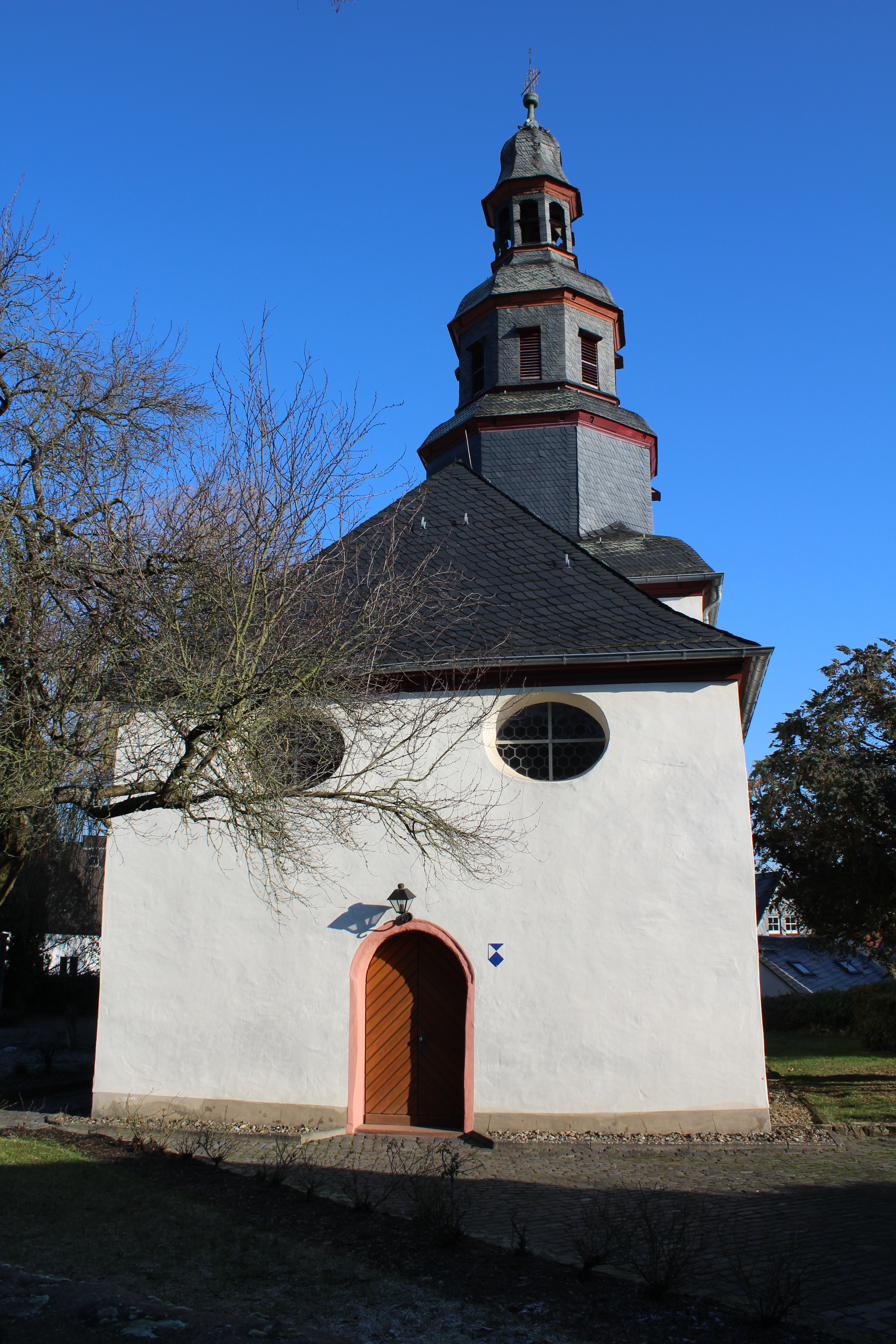 Evangelische Kirche Steindorf, Wetzlar, Lahn-Dill-Kreis, Hessen, Deutschland